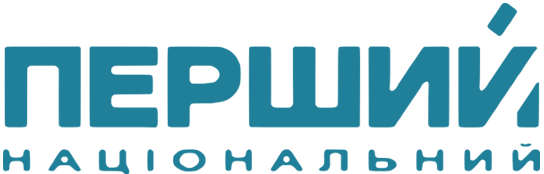 Логотип Первого национального телеканала Украины